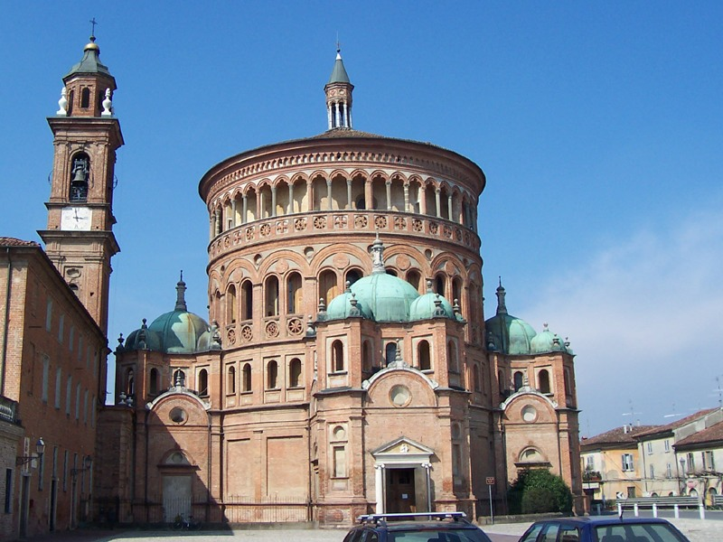 Crema - Santuario di S. Maria della Croce